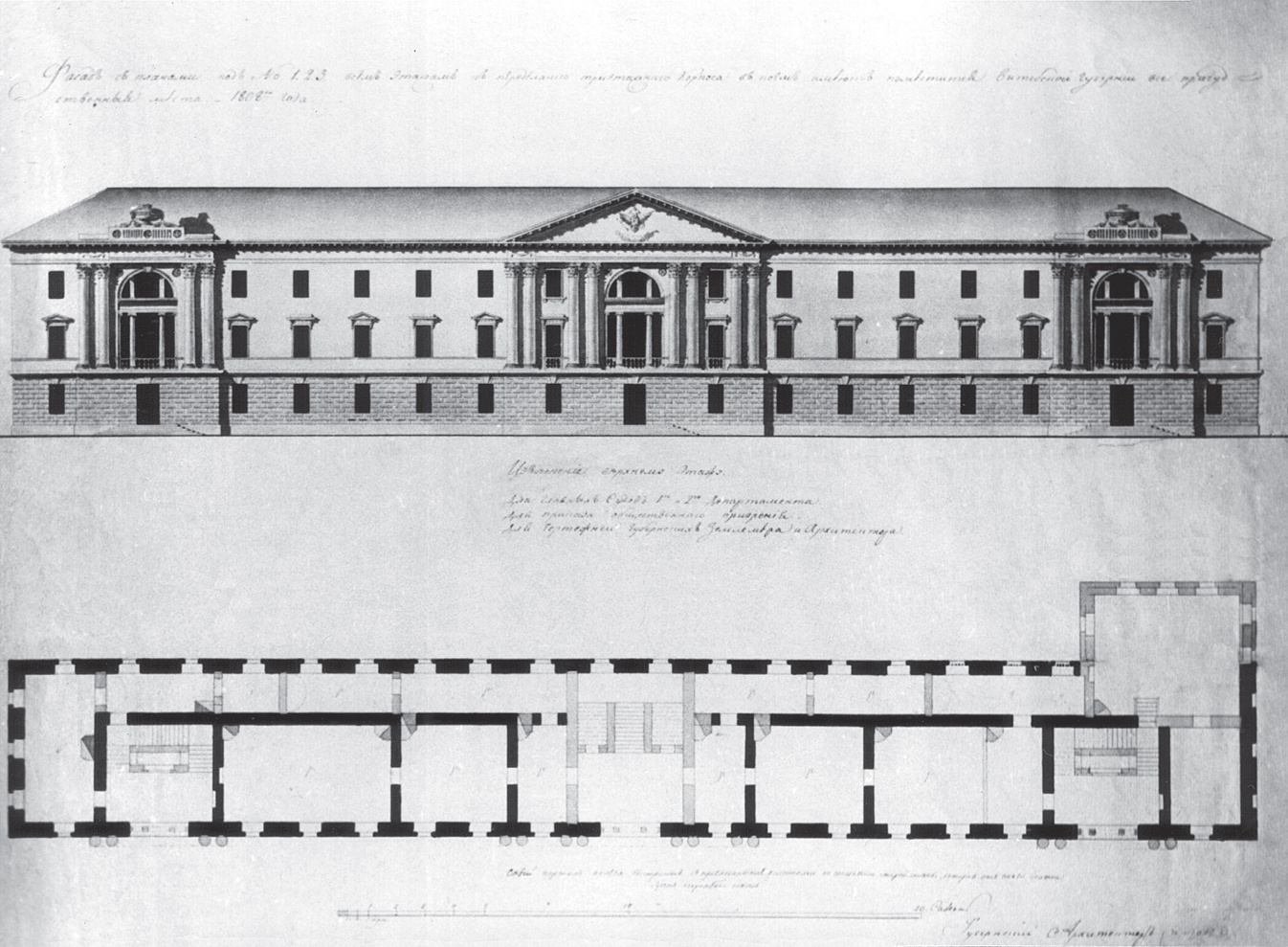 Беларуская (тарашкевіца): Віцебск (Viciebsk), Прачысьценская гара (Pračyścienskaja hara). Праект прыстасаваньня манастыра базылянаў пад прысутныя месцы